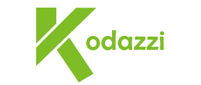 Kodazzi Framework